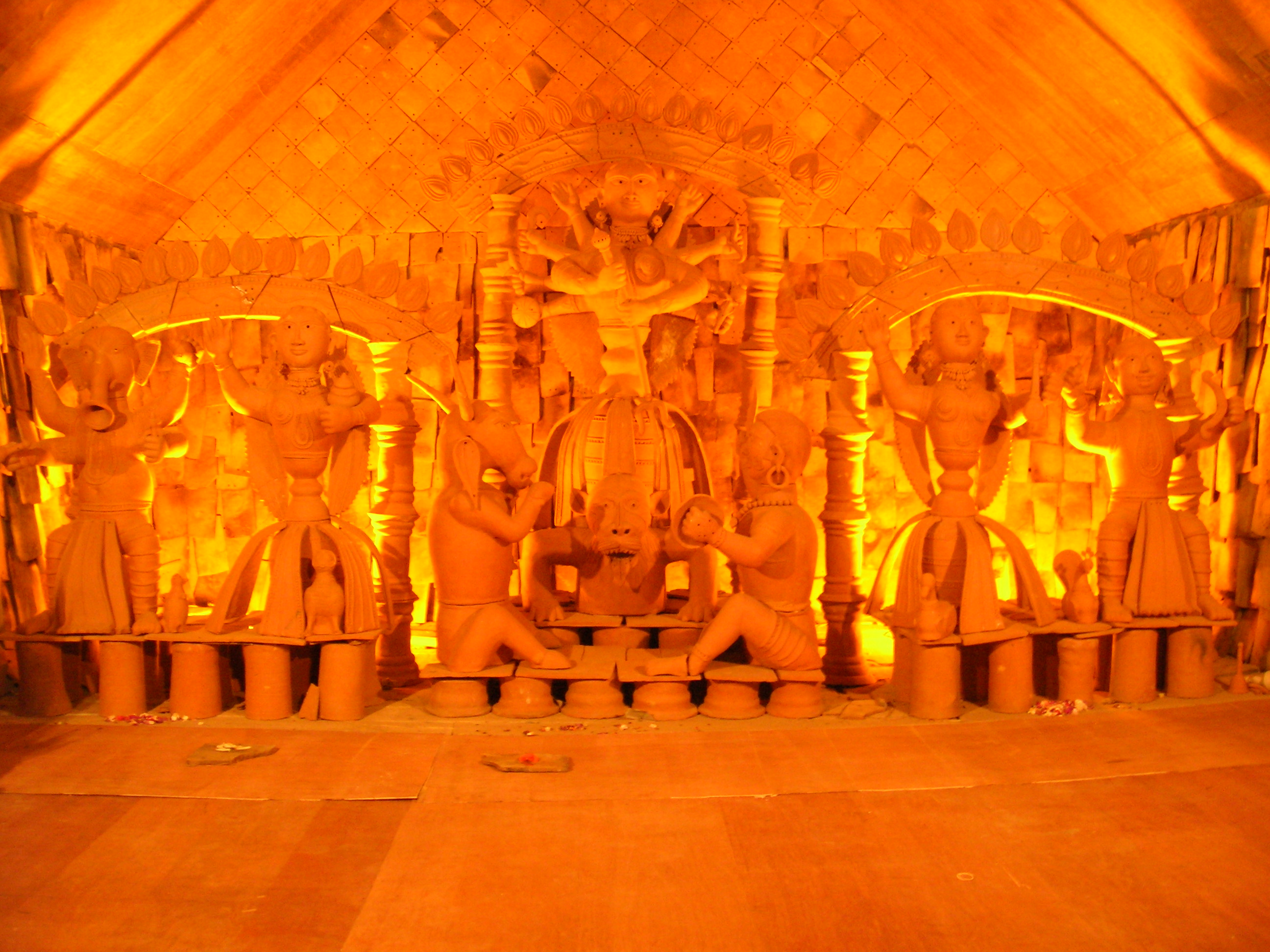 theme puja pandal in Kolkata